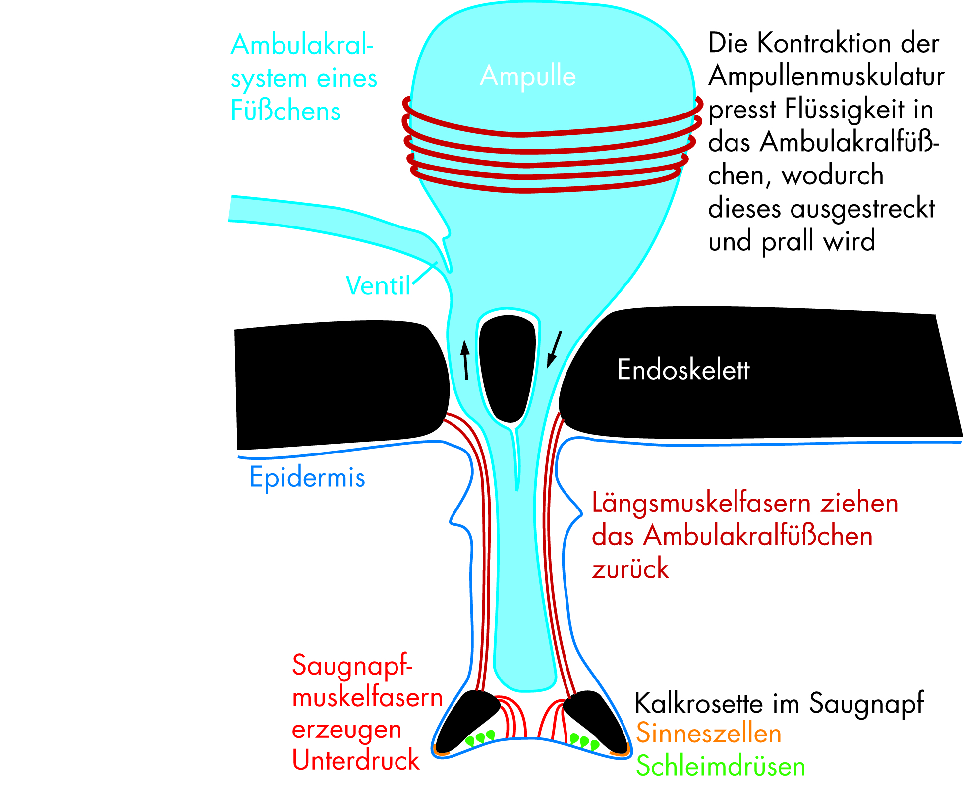 Please quote: "G. Weitbrecht, wikimedia commons". Schematisiertes Ambulacralfüßchen eines Seeigels mit erläuternden Texten.